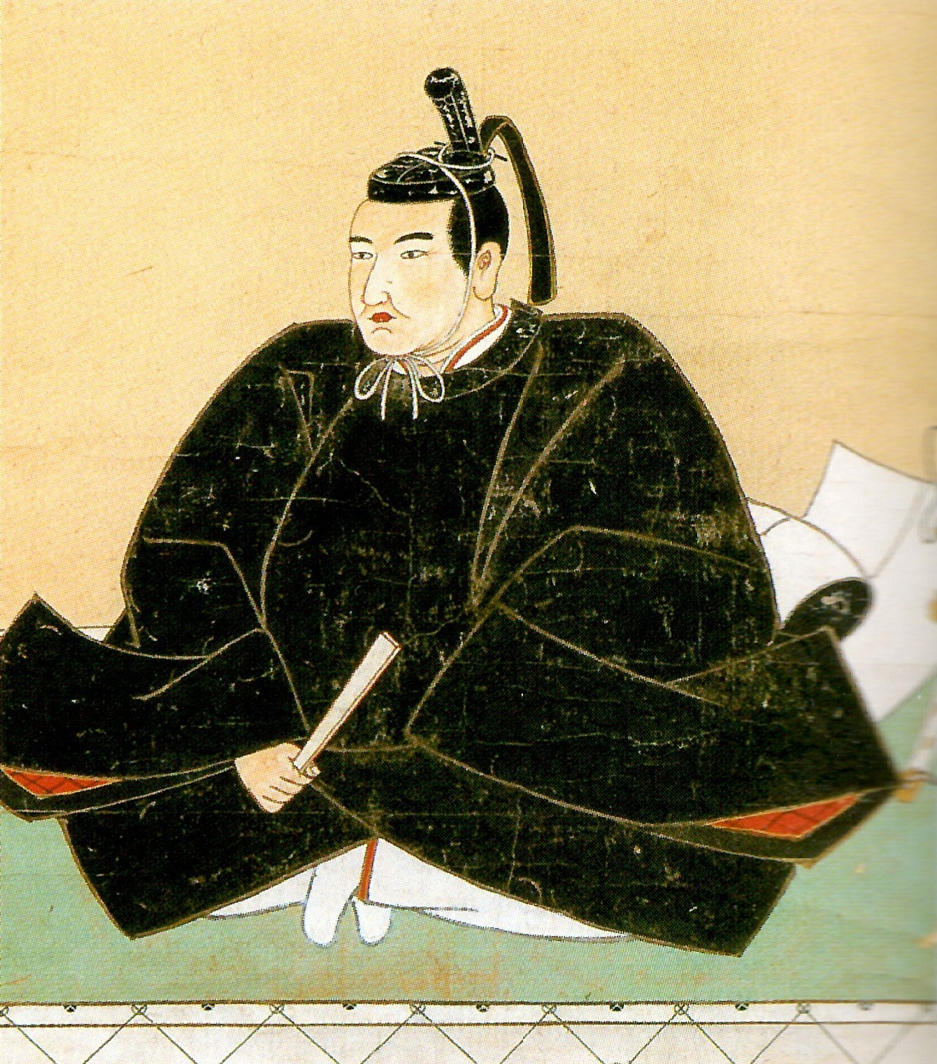 立花鑑一(筑後国柳河藩第7代藩主立花鑑通の四男で、第9代立花鑑賢の実父)の肖像。